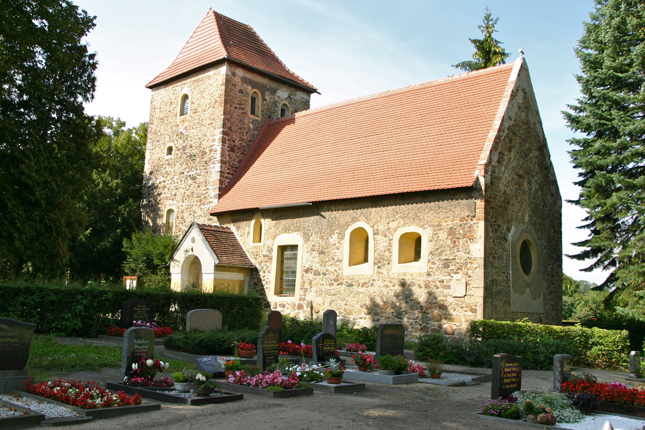 Die romanische Feldsteinkirche in Scheuder, einem Teil der Stadt Südliches Anhalt in Sachsen-Anhalt.